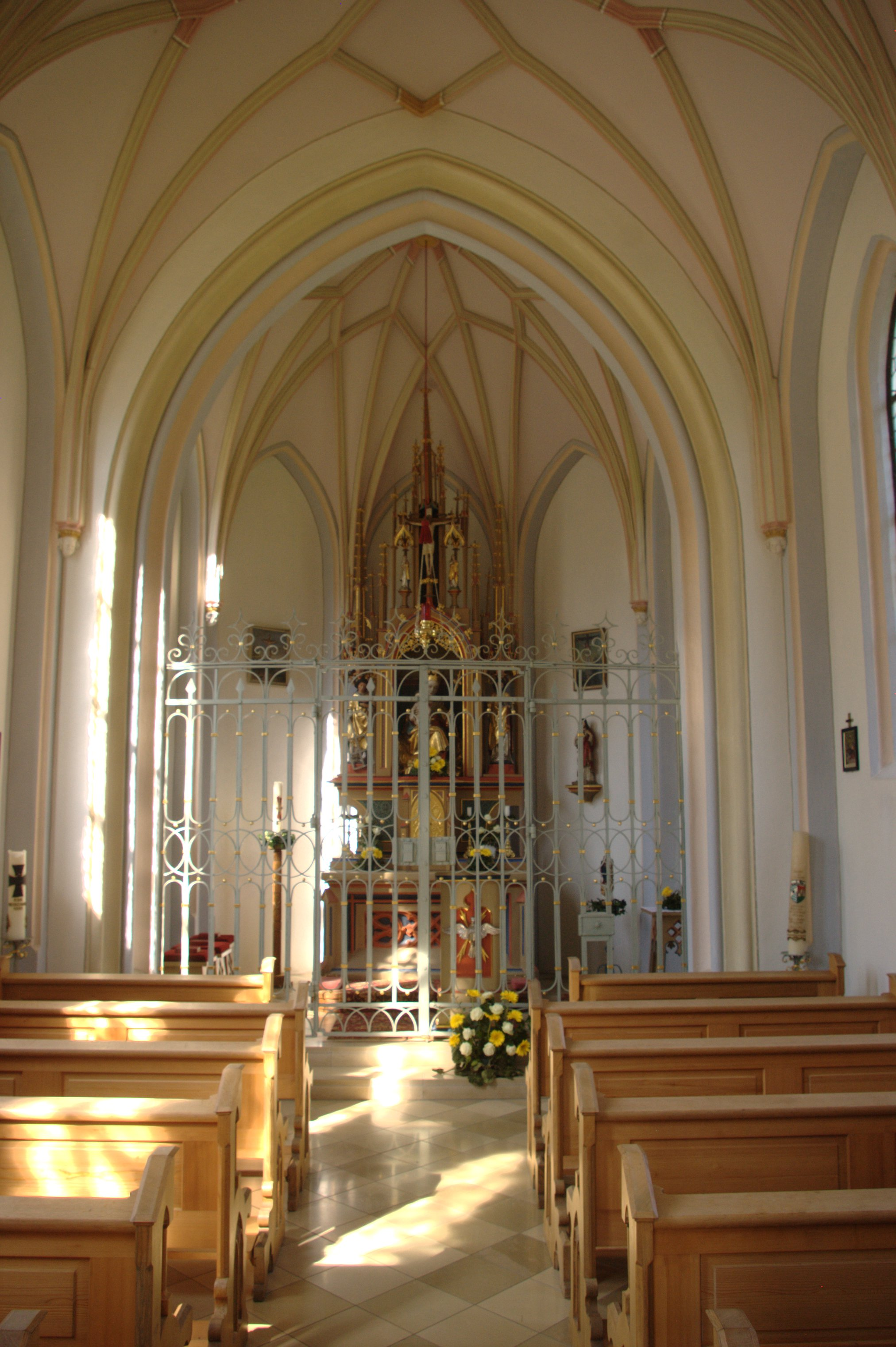 Innenraum und Chor der KümmerniskapelleThis is a photograph of an architectural monument.